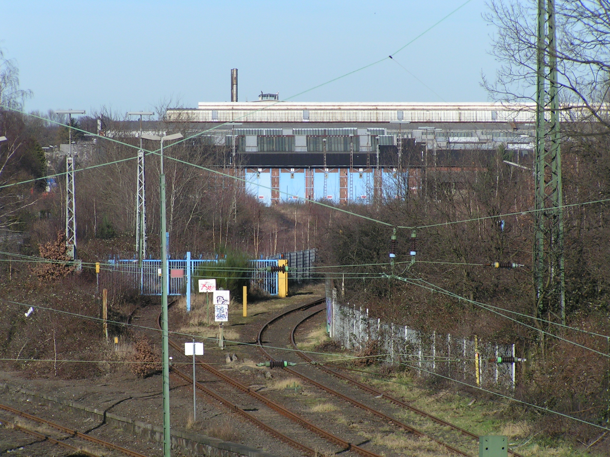 Gleiszufahrt des ehemaligen Ausbesserungswerks Opladen, Leverkusen-Opladen, Deutschland